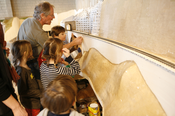 Bernhard Tarnutzer, der Erbauer der Modellanlage, erklärt Kindern die Bauweise